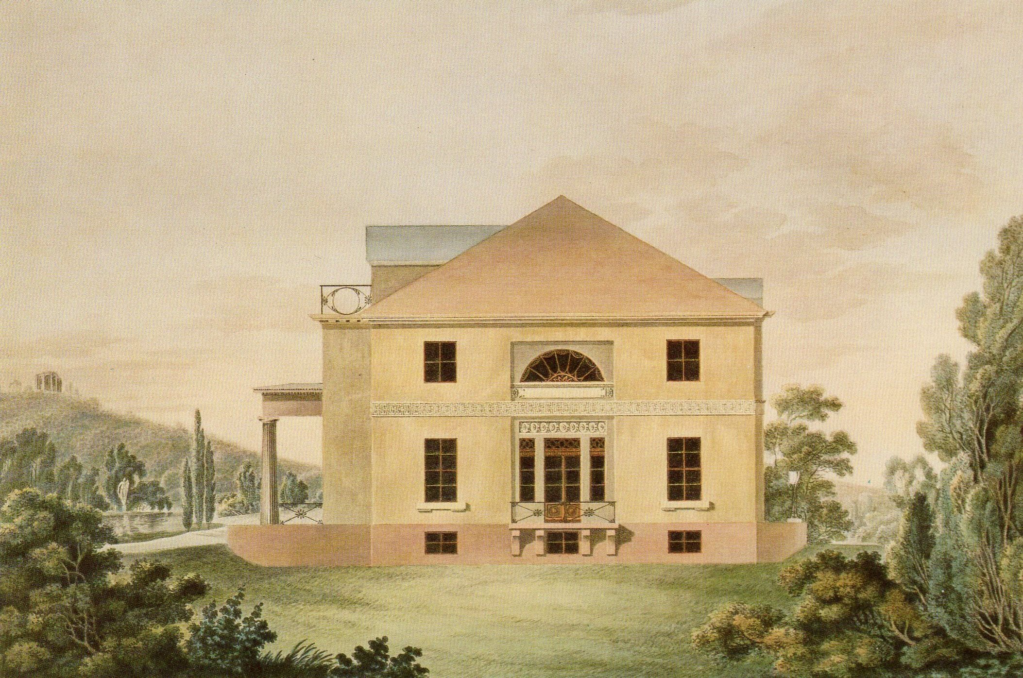 Ansicht der Schmalseite des Steglitzer Herrenhauses im Jahr 1808, Aquarell von C. Elfner nach Heinrich Gentz